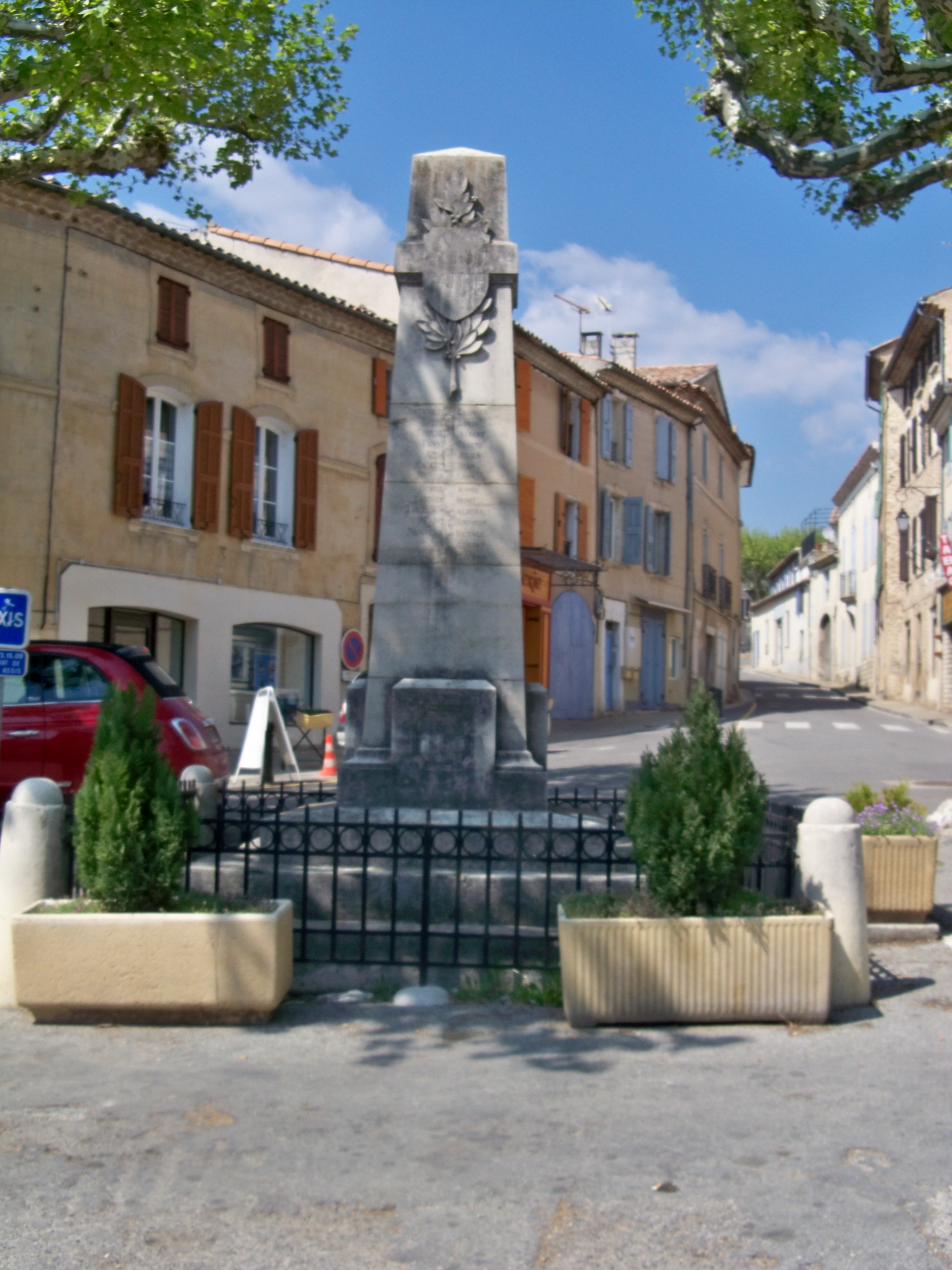 Monument aux morts de Saint Etienne les Orgues